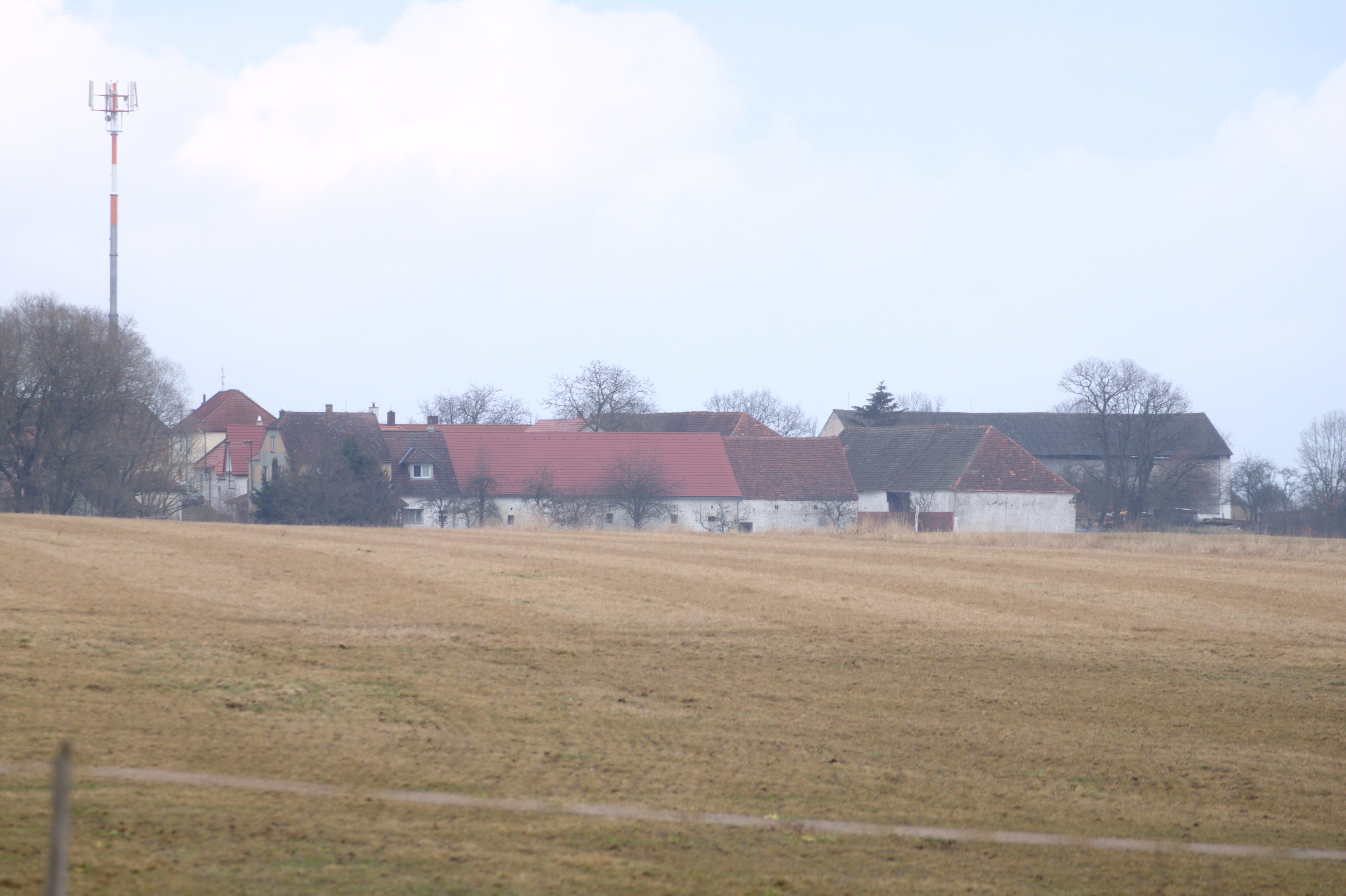 Pohled na Sedlovice z vesnice Zvěřetice Project: Fotíme Česko